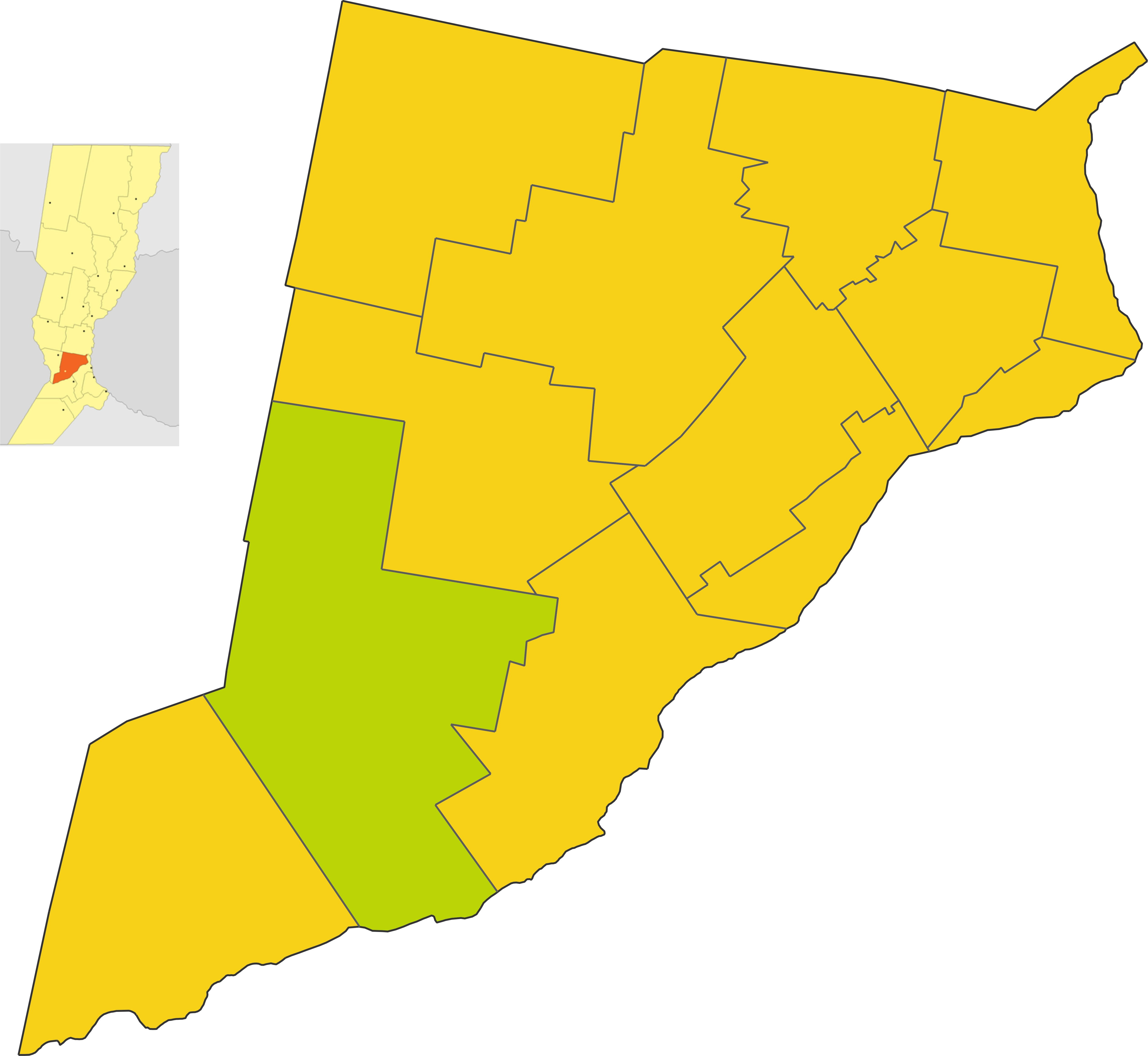 Map of the comuna de Cañada de Gomez in Iriondo department, Santa Fe province, Argentina